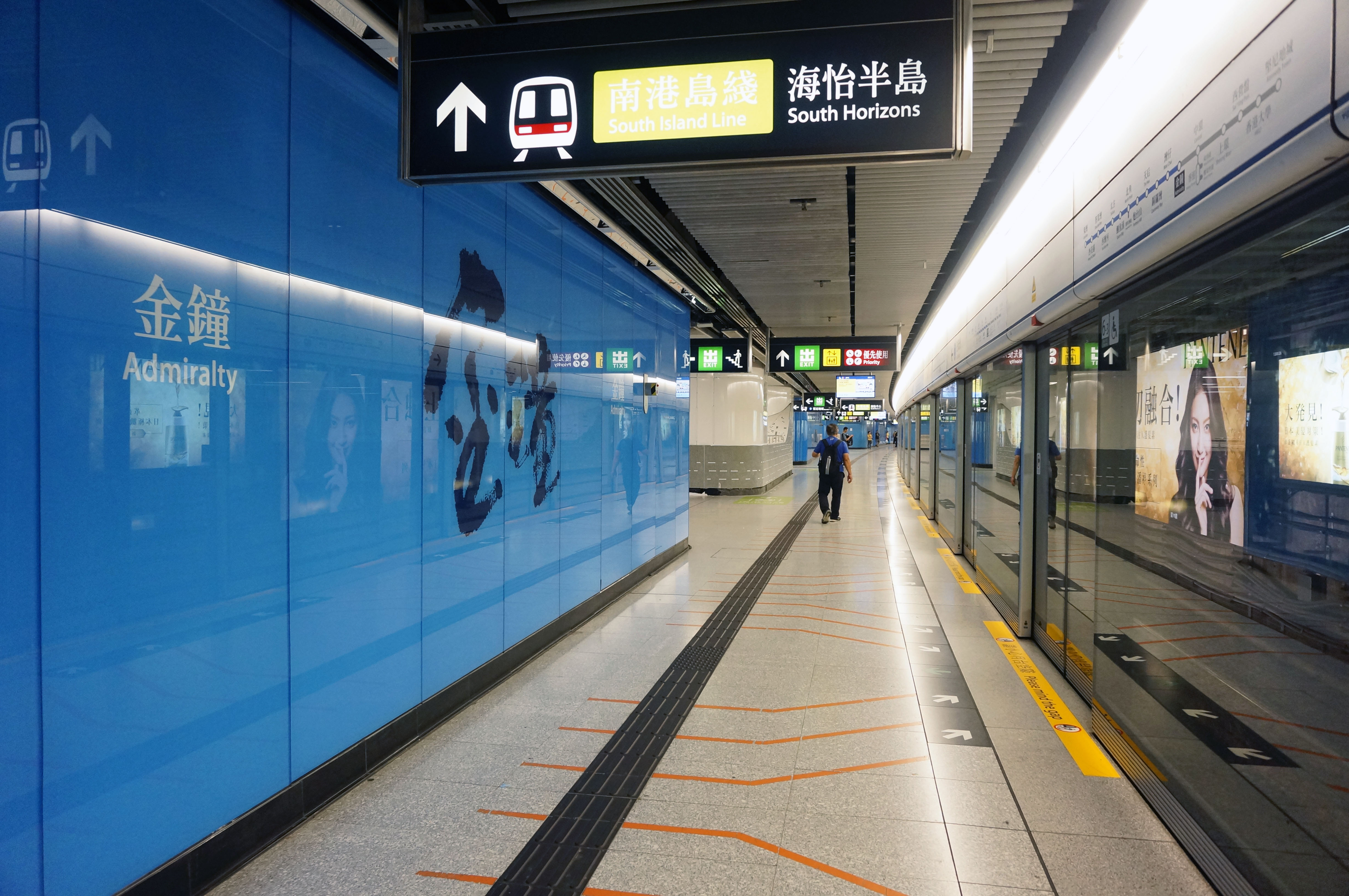 港鐵金鐘站月台